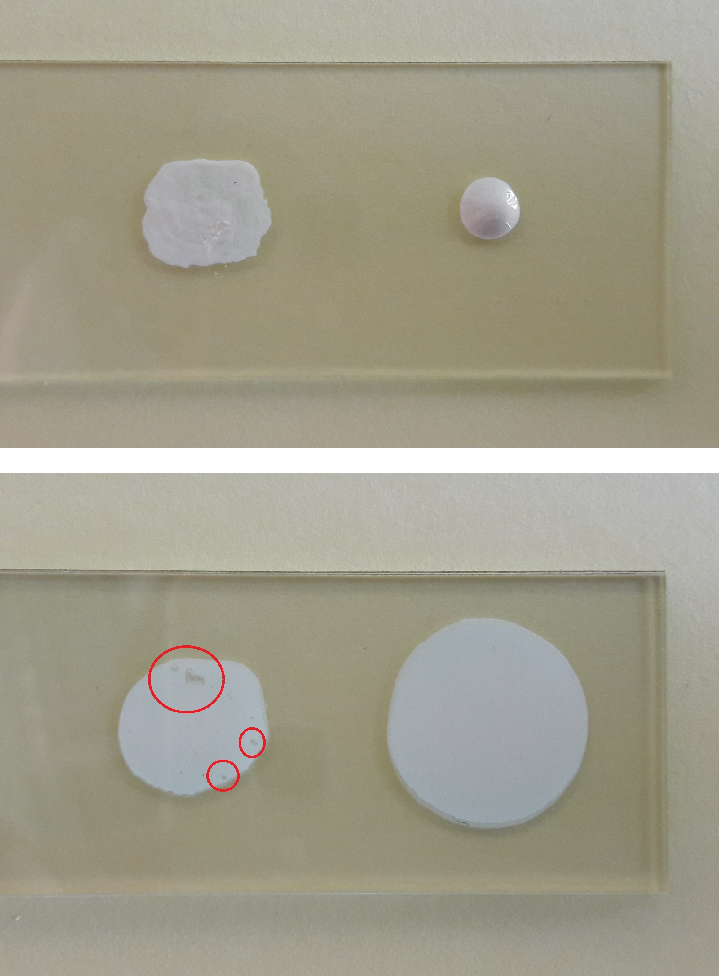 Vergleich von Verarbeitungsmethoden von Wärmeleitpaste. Die Anwendung erfolgte zwischen zwei Glasplatten. Die flächige Verarbeitung weist Lufteinschlüsse auf (rot markiert).